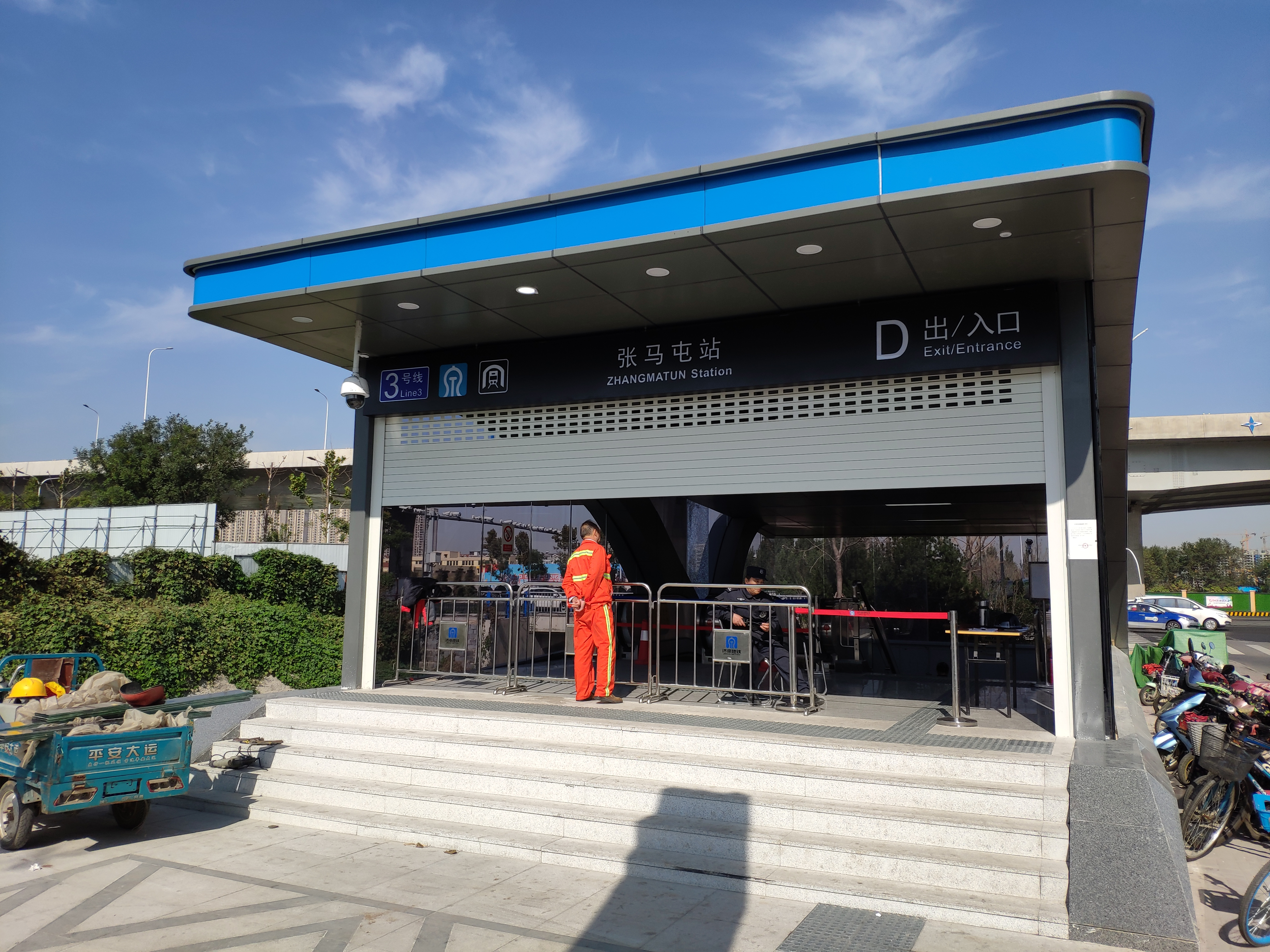 济南地铁3号线，张马屯站D出口。尚未对外开放，仅限工作人员入内。